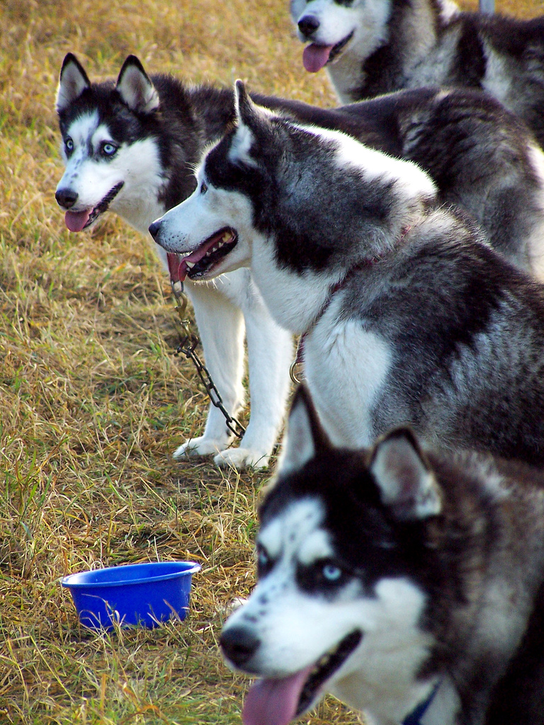 Siberian Huskies in Brandenburg, Germany.